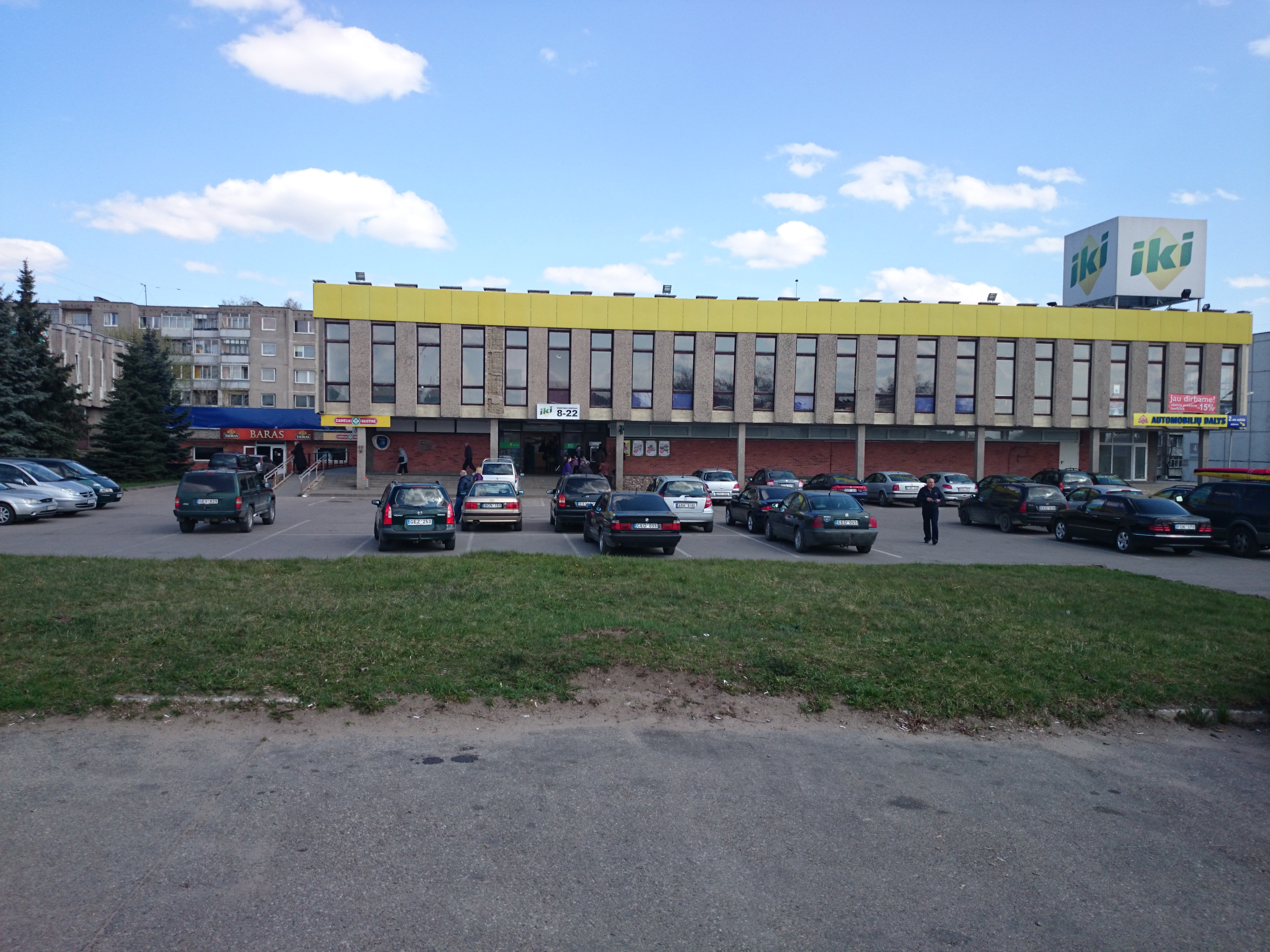 Kosmonautai